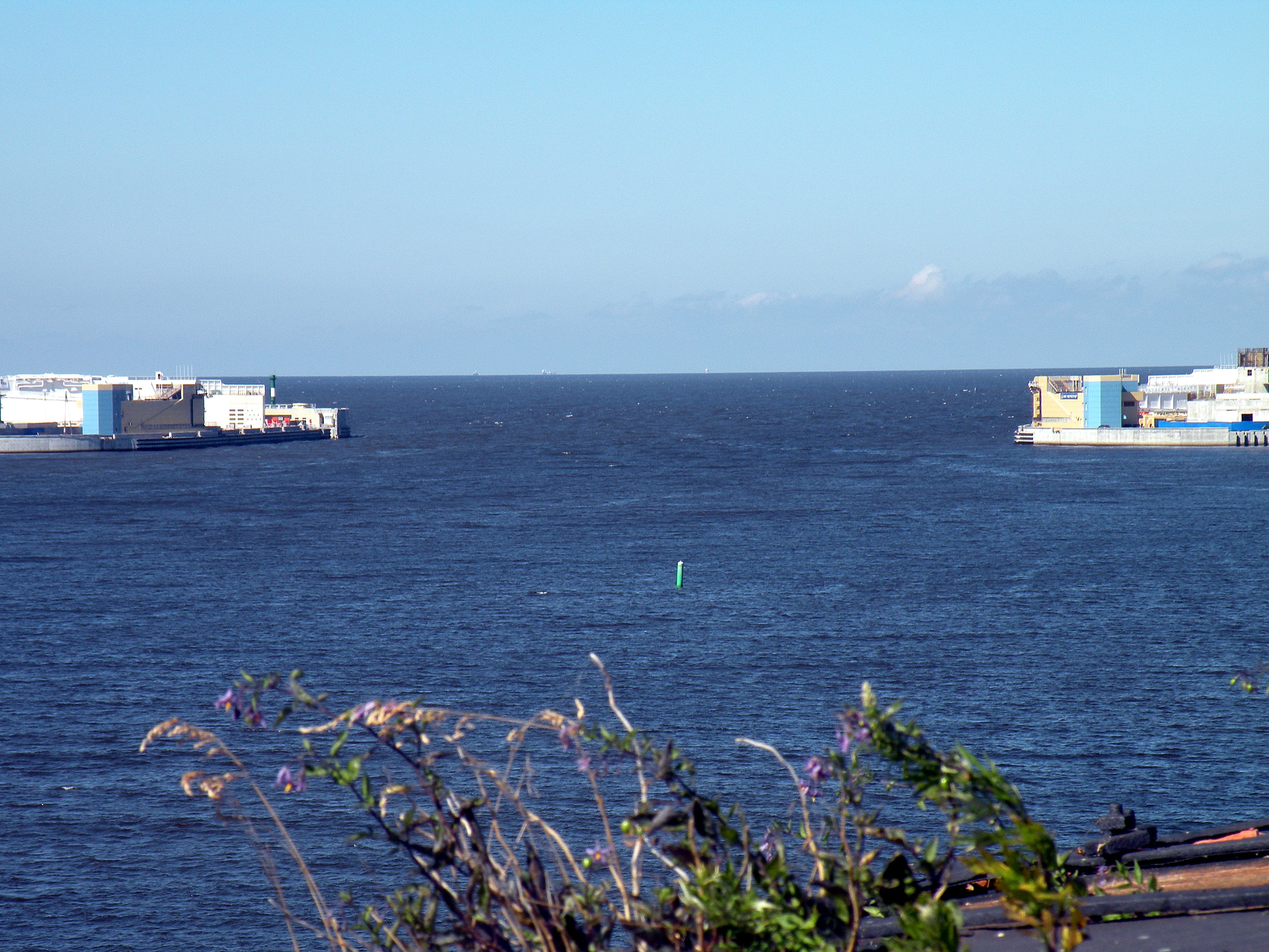 Дамба.Выход с Кронштадтского рейда